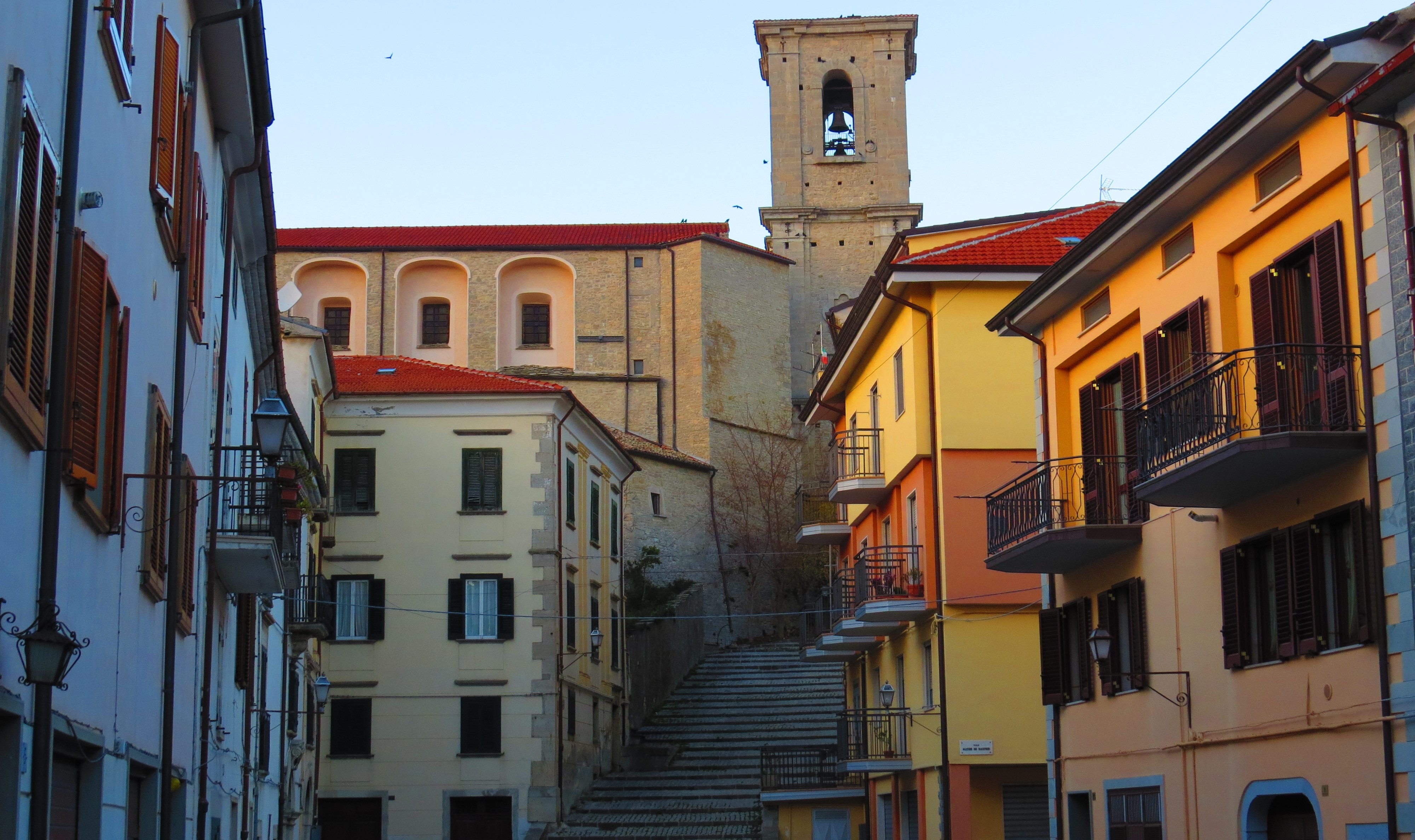 Chiesa e scale (vista)